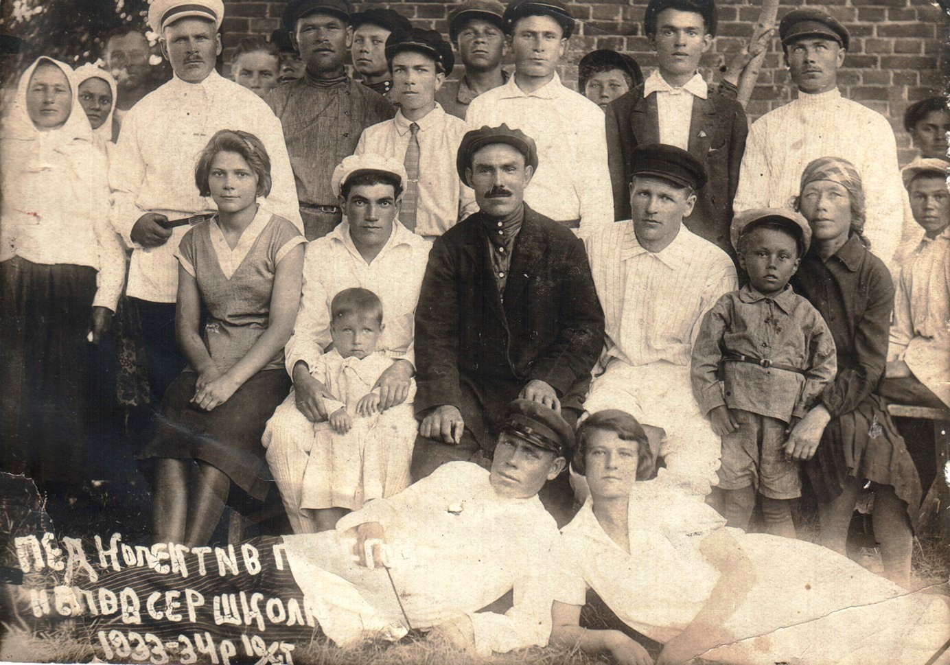 Педагогічний колектив 33-34 роки